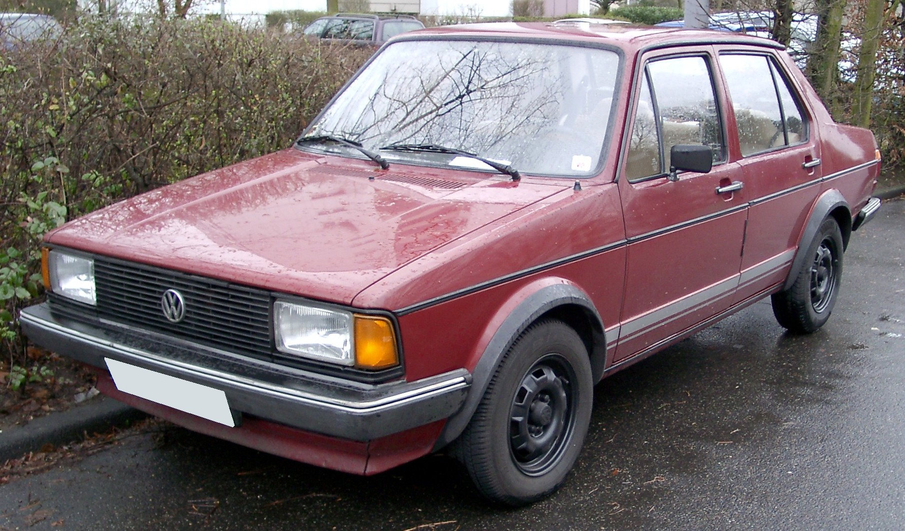 VW Jetta